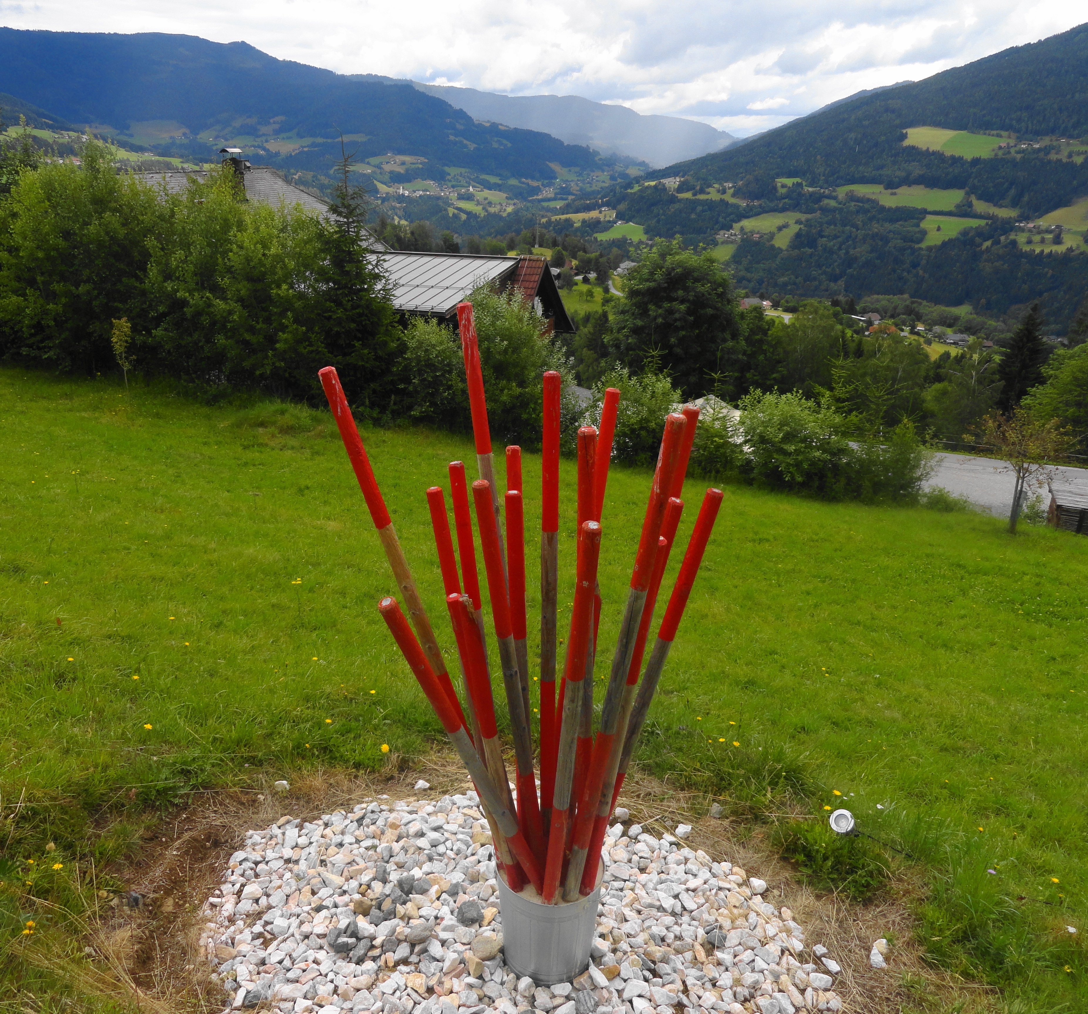 Verditz - einst Skigebiet nun Skulpturenpark, Gemeinde Treffen am Ossiachersee, Villach Land, Kärnten, Österreich, EU. Julya Rabinowich - Töchter und Söhne, 2014 - 21 gebrauchte Schneestangen, Markierstift, ca. 110 x 230 cm [1]